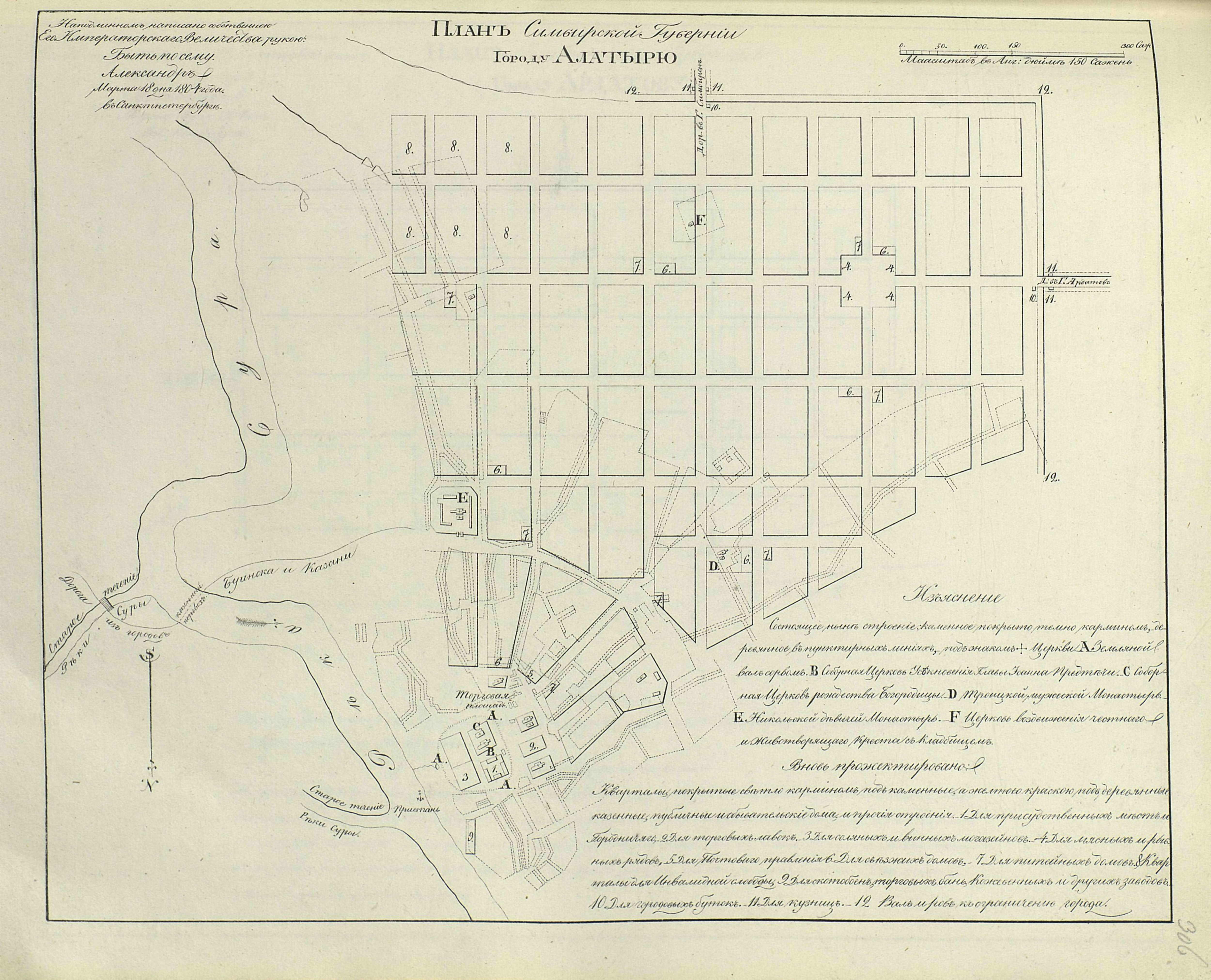 Полное Собрание Законов Российской Империи. Собрание первое. Книга чертежей и рисунков. (Планы городов).; 1839, Санктпетербургъ, Въ Типографіи II Отделенія Собственной Е. И. В. Канцеляріи.